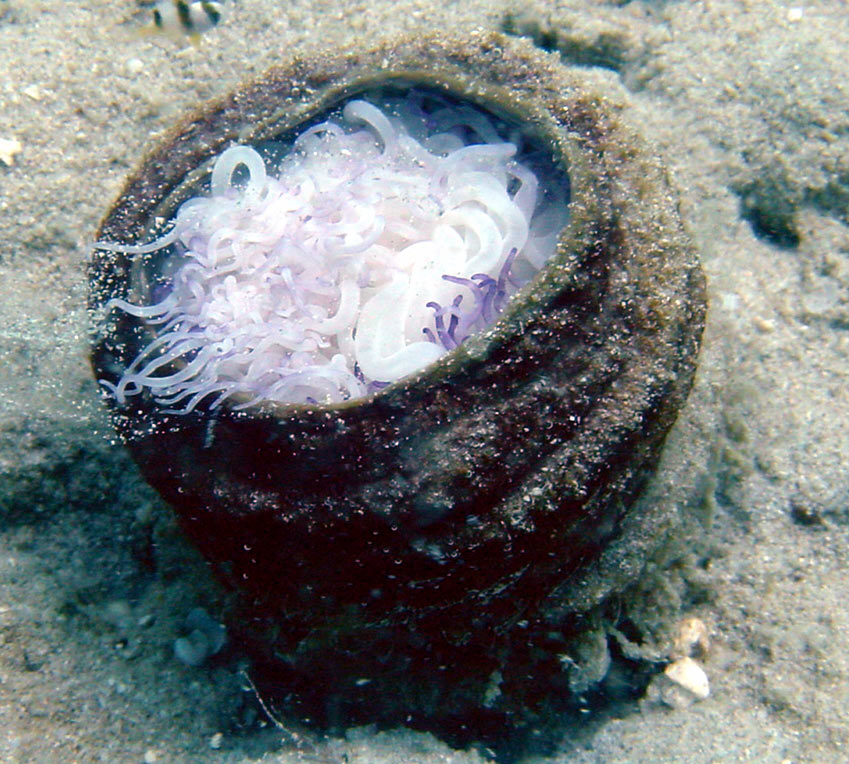 Cerianthus sp. retraído, en Koh Phangan, Tailandia